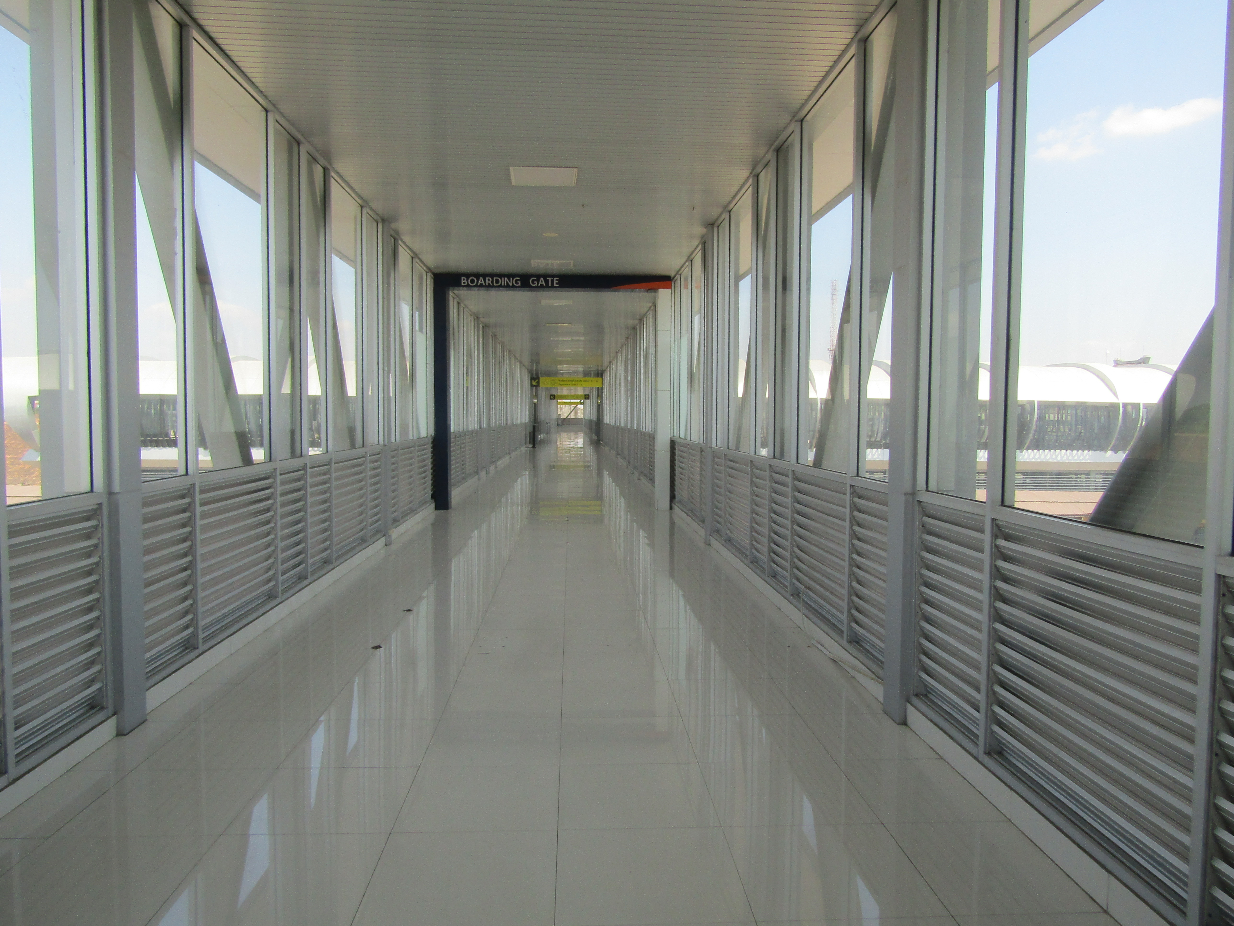 Jembatan penyeberangan orang di Stasiun Solo Balapan yang menghubungkan stasiun dengan Terminal Tirtonadi